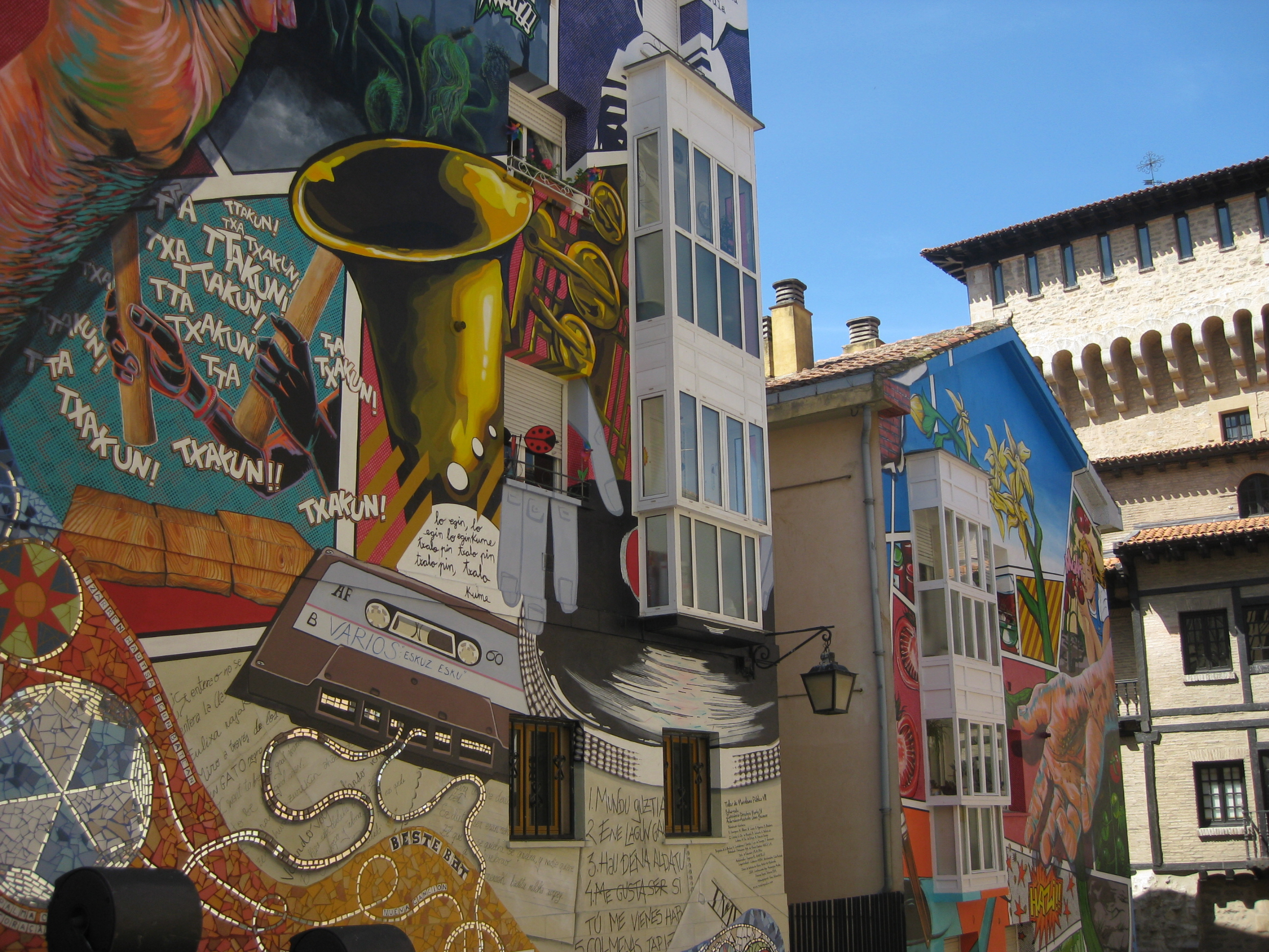 Mural en el cantón de las carnicerías. Casco medieval de Vitoria-Gasteiz